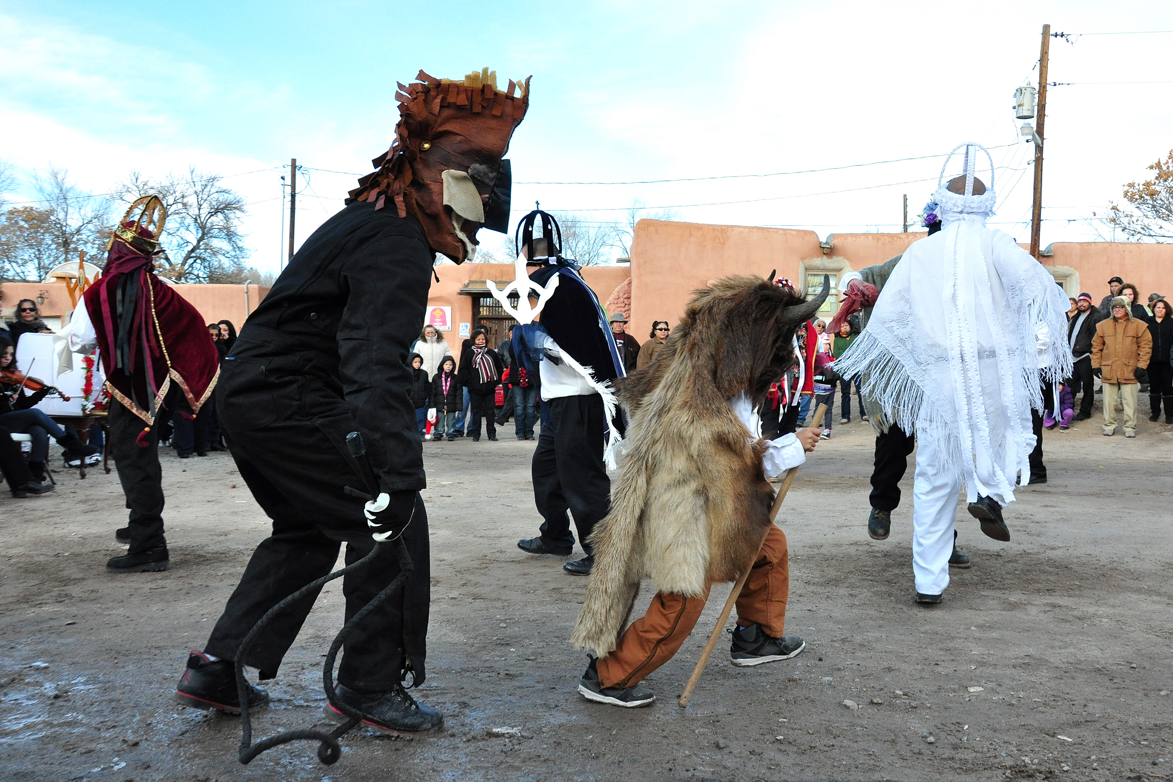 Capilla de San Antonio - Alcalde, NM